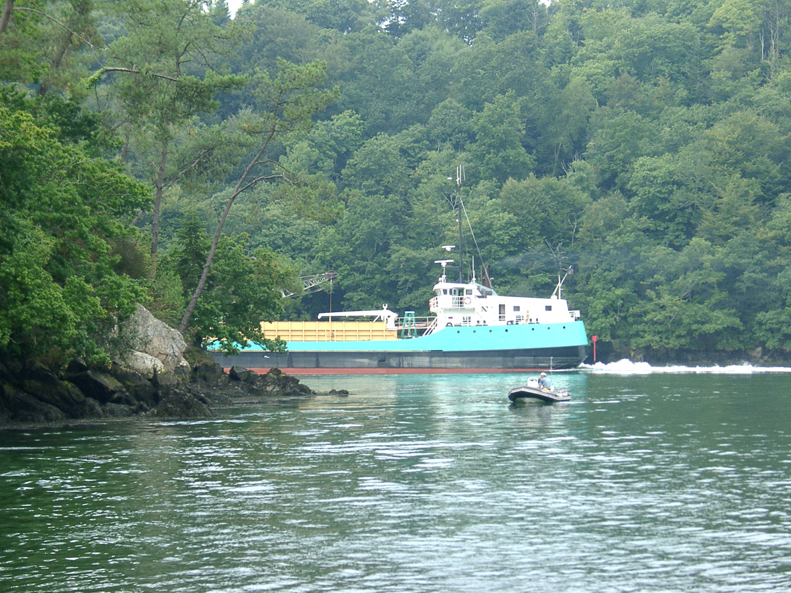 Description : La drague "Penfret" dans un virecourt de l'Odet Lieu : rivière de l'Odet, Bretagne, France Année : 2001 Auteur : Pline photo personnelle